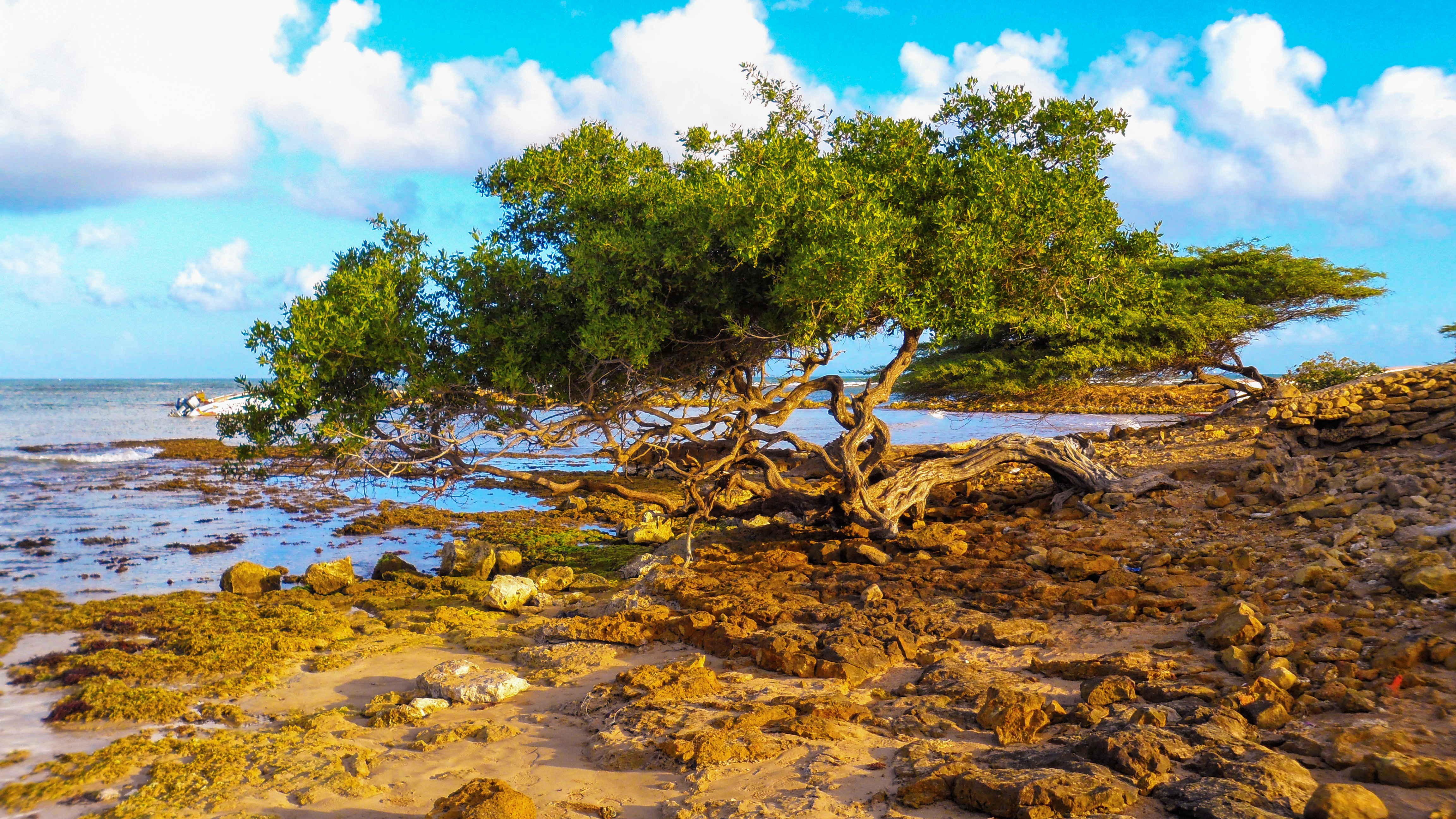 Puerto Escondido.